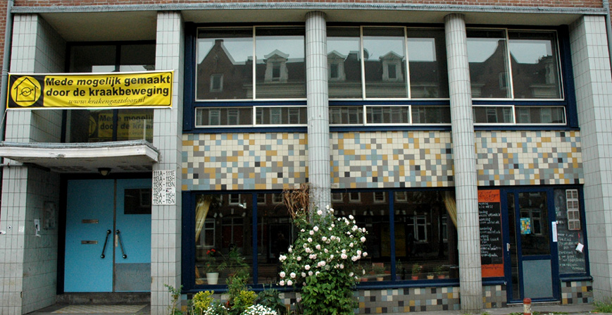 De voorgevel van De Frederik Hendrikschool in Amsterdam.